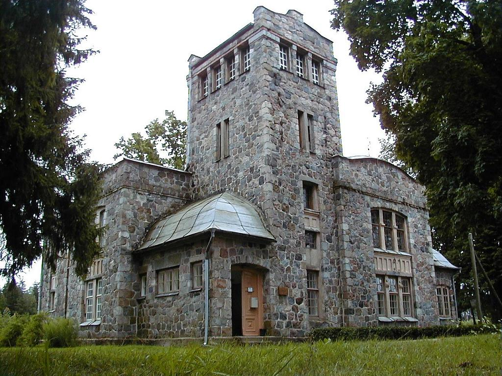 Jaunannas medību pils 2001-08-04